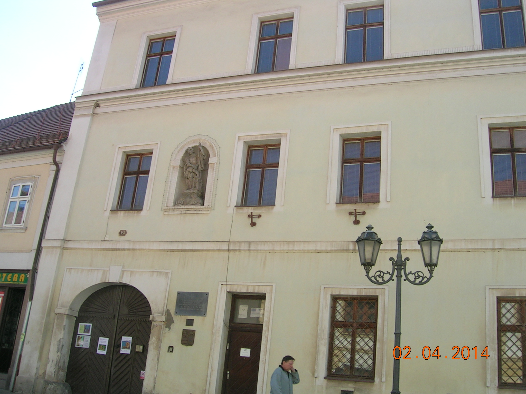 Dům Na Staré poště